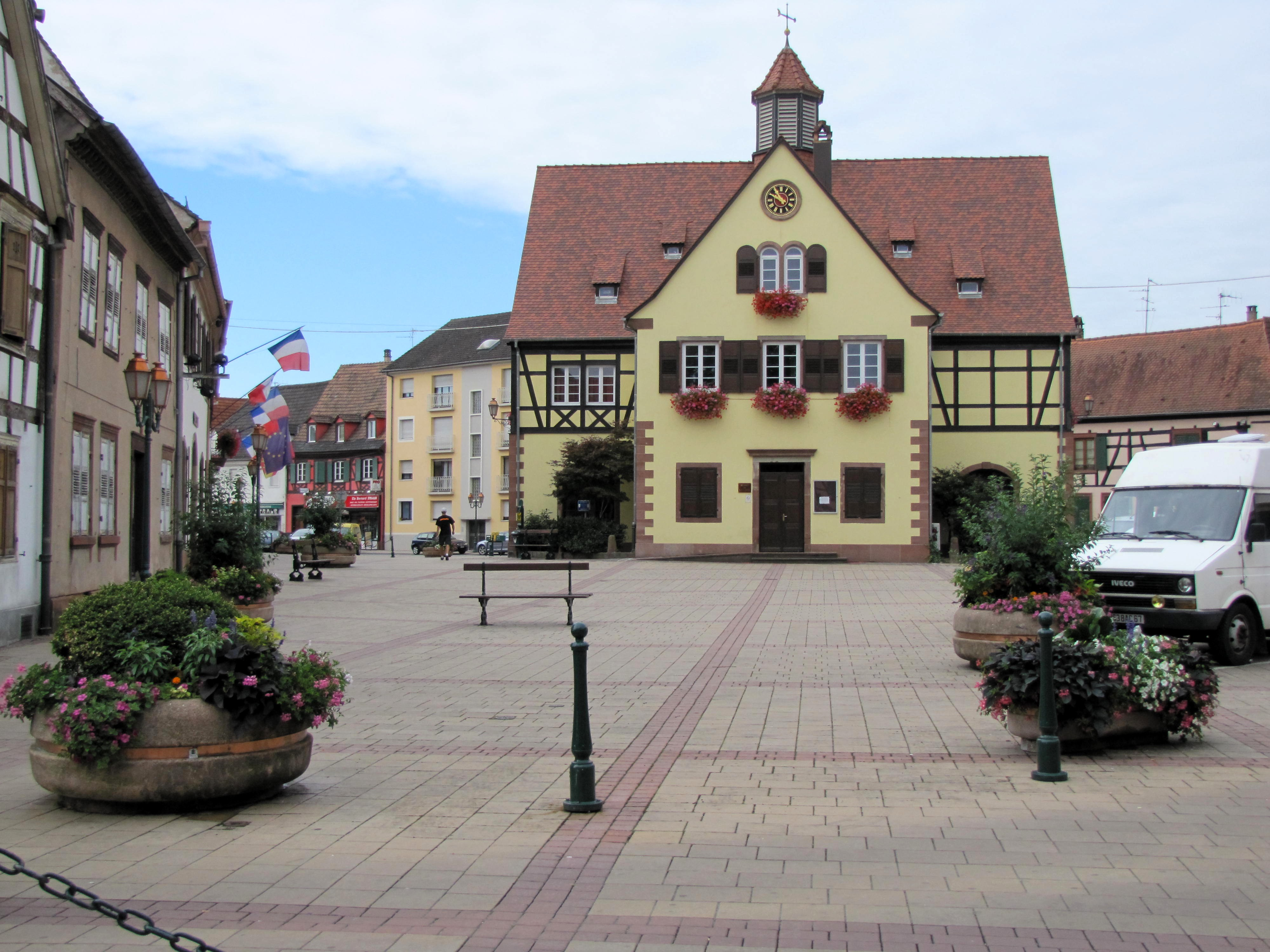 Alsace, Bas-Rhin, Bischwiller, Ancienne Mairie dite "Laube" (XVIIe-XIXe), place de la Mairie (IA00124087).